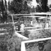 Bundesgartenschau 1957 in Köln - Wasserterrassen